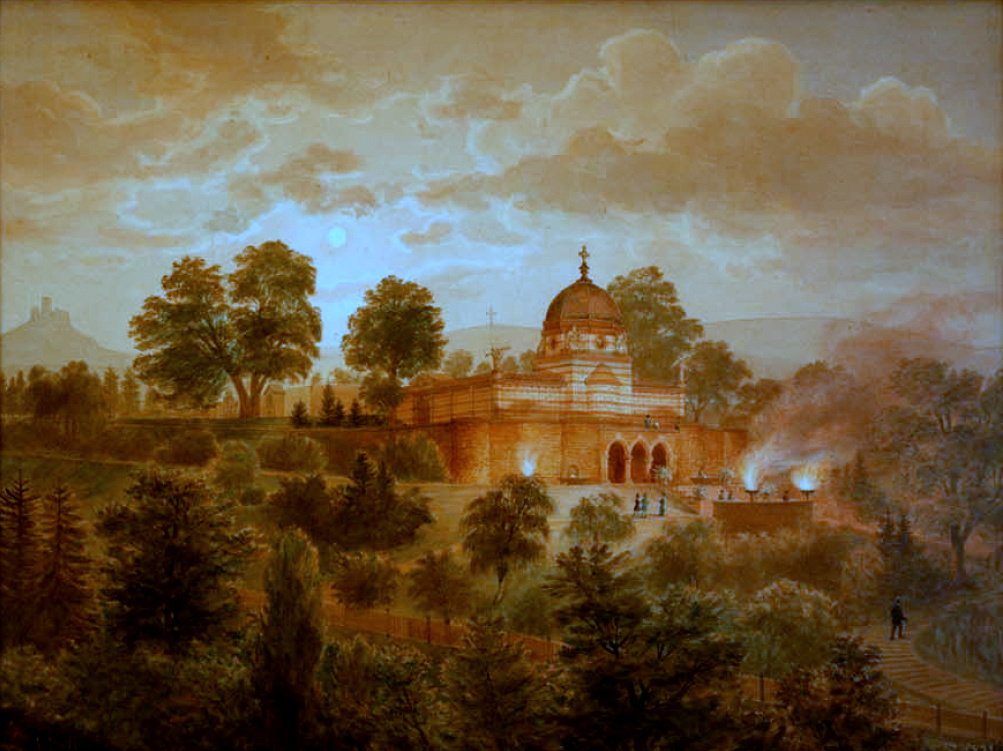 Mausoleum der Familie Schuchard bei Warburg-Calenberg, Zeichnung von J. Scheim 1886